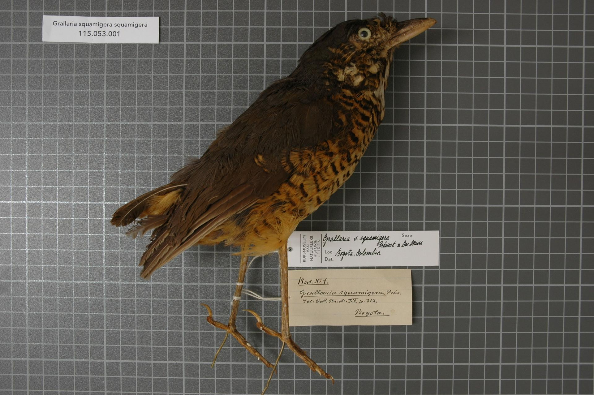 Grallaria squamigera squamigera Prévost & Des Murs, 1842